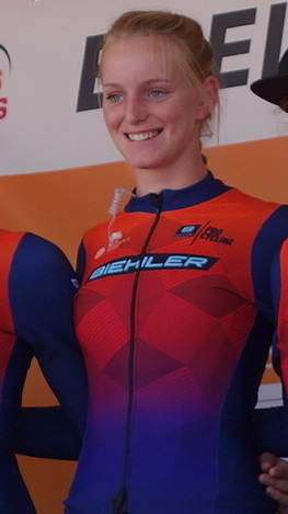 Merel Hofman (Biehler) bij de start van de eerste etappe van Stramproy naar Weert in de Boels Ladies Tour 2019